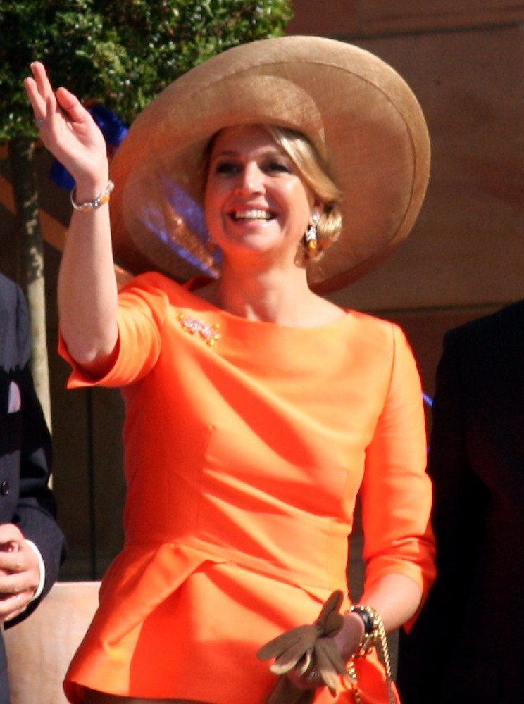 La reine Máxima le 3 juin 2013.